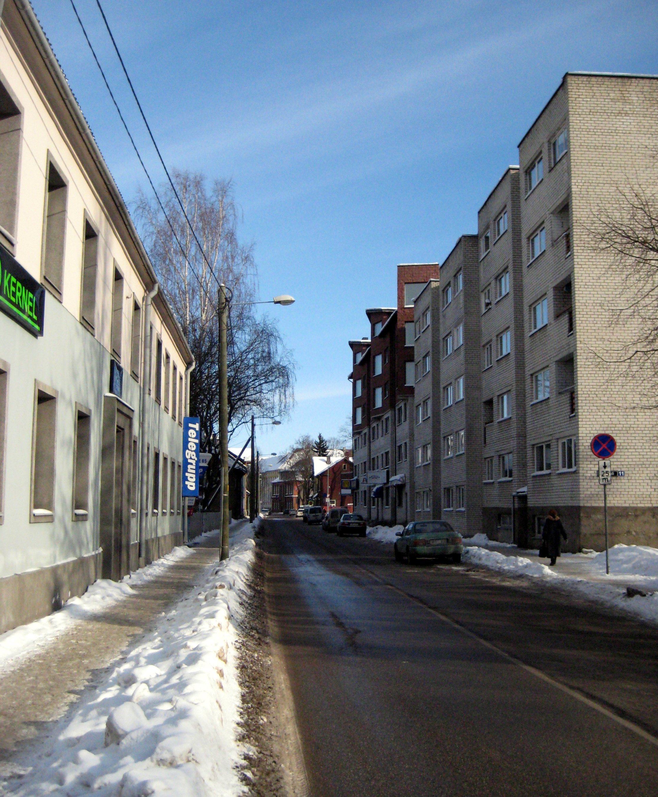 Vanemuise tänava lõpp Vaksali tänaval, Tartu